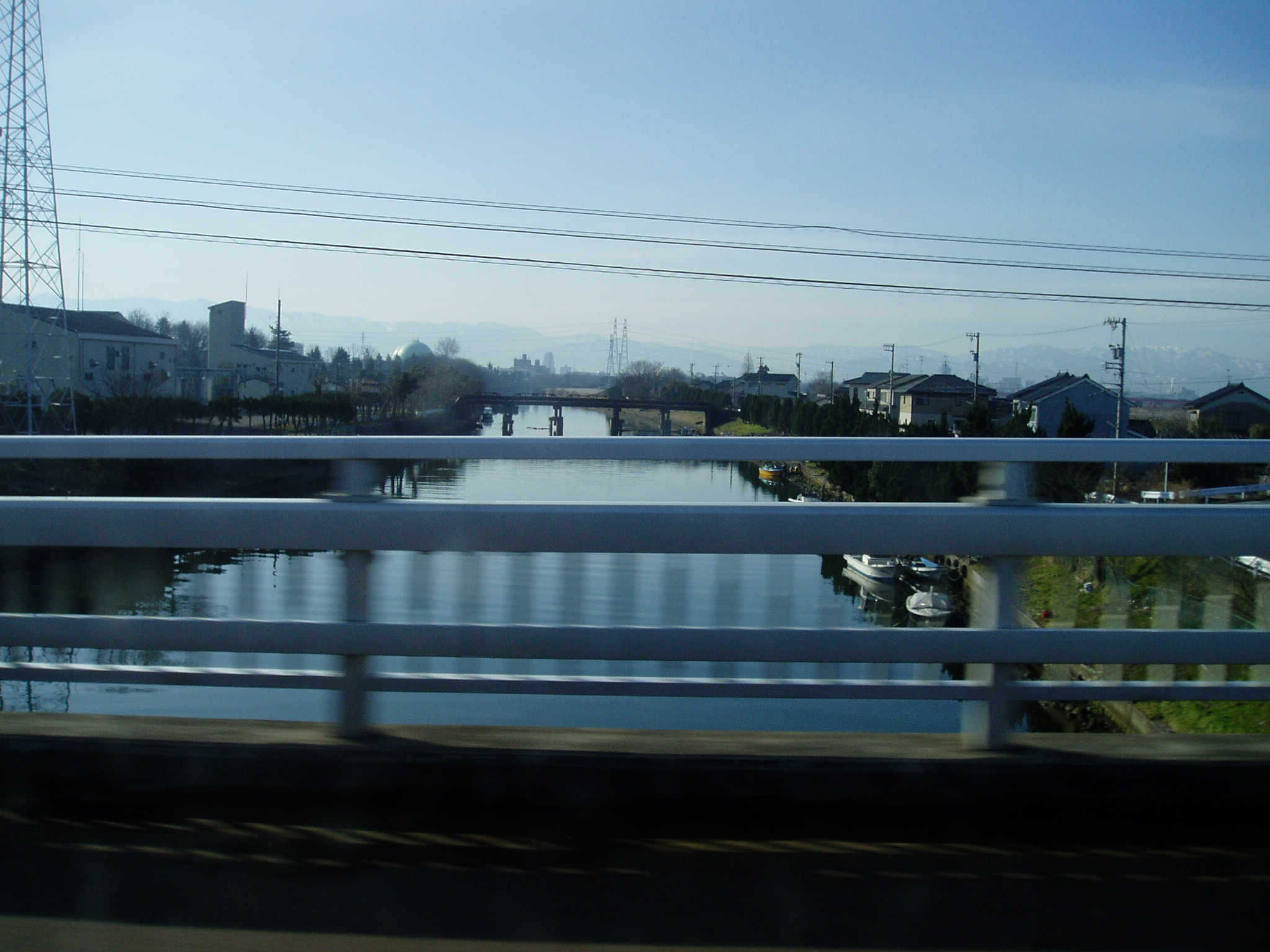 国道415号線の萩浦橋から撮影した富岩運河